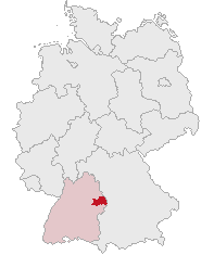 Ostalbkreis, Baden-Württemberg, Germany